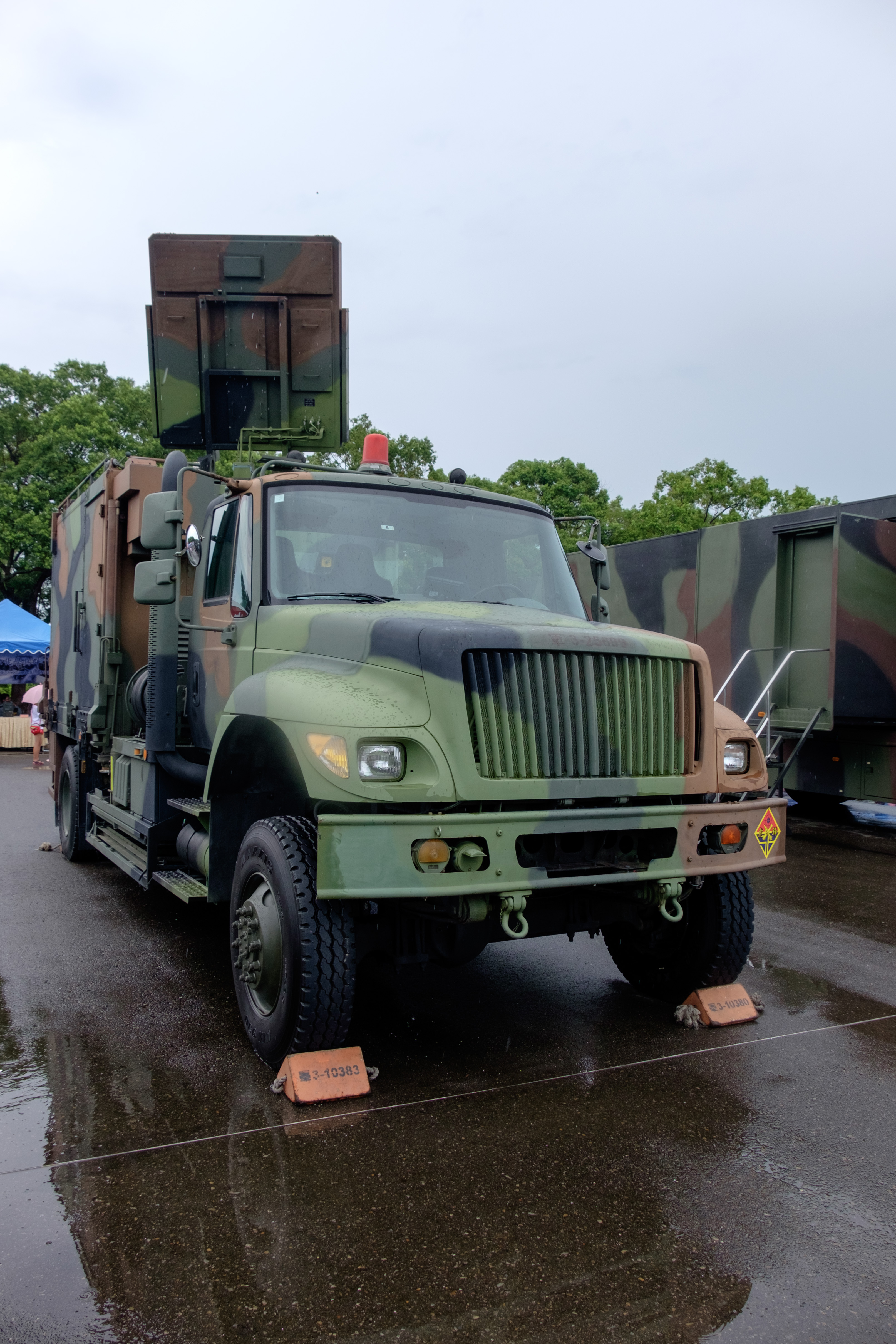 2015年成功嶺營區開放活動，介壽臺大校場展示搭載於中型戰術輪車的陸軍蜂眼雷達系統。